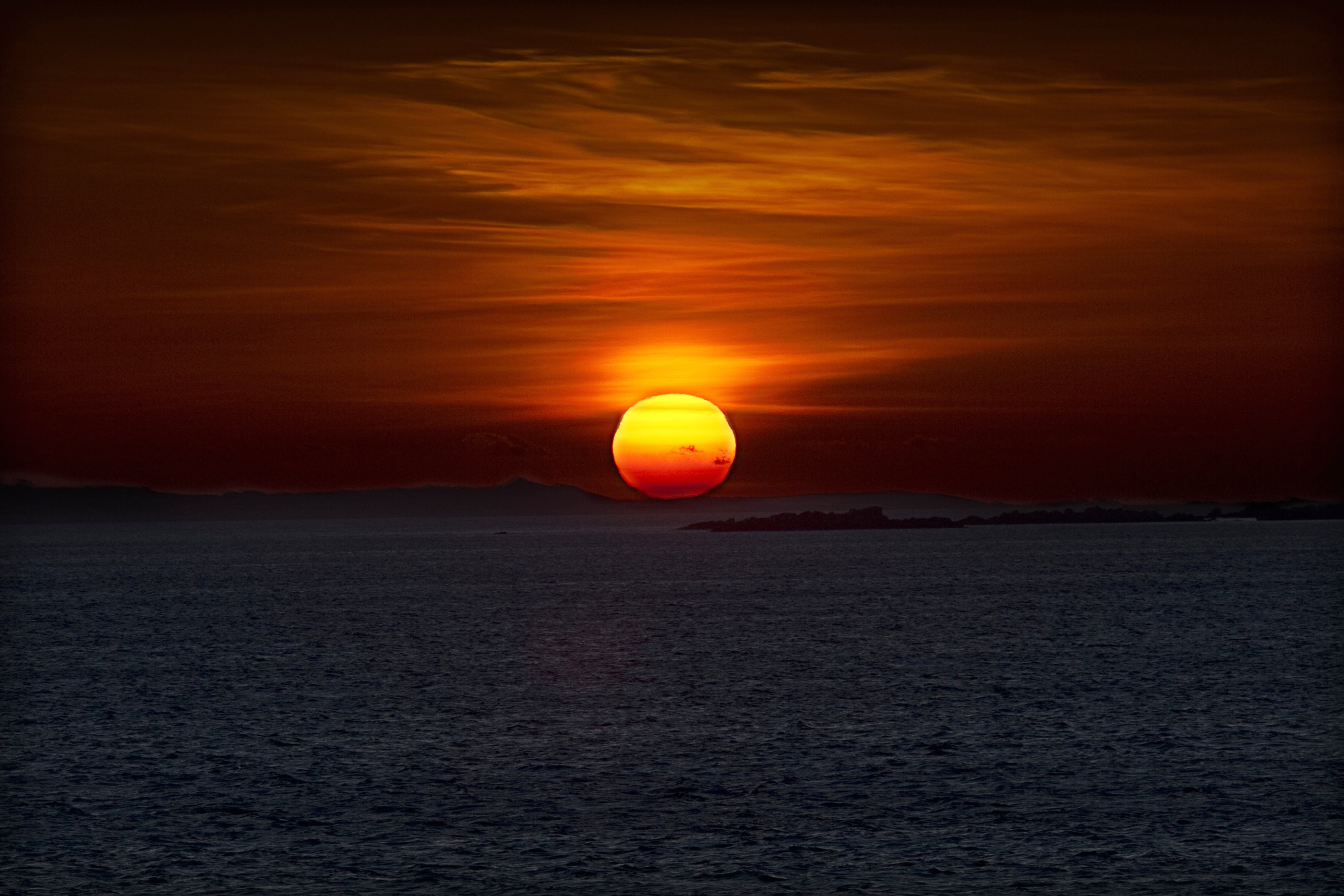 Sobre a Illa de Sálvora